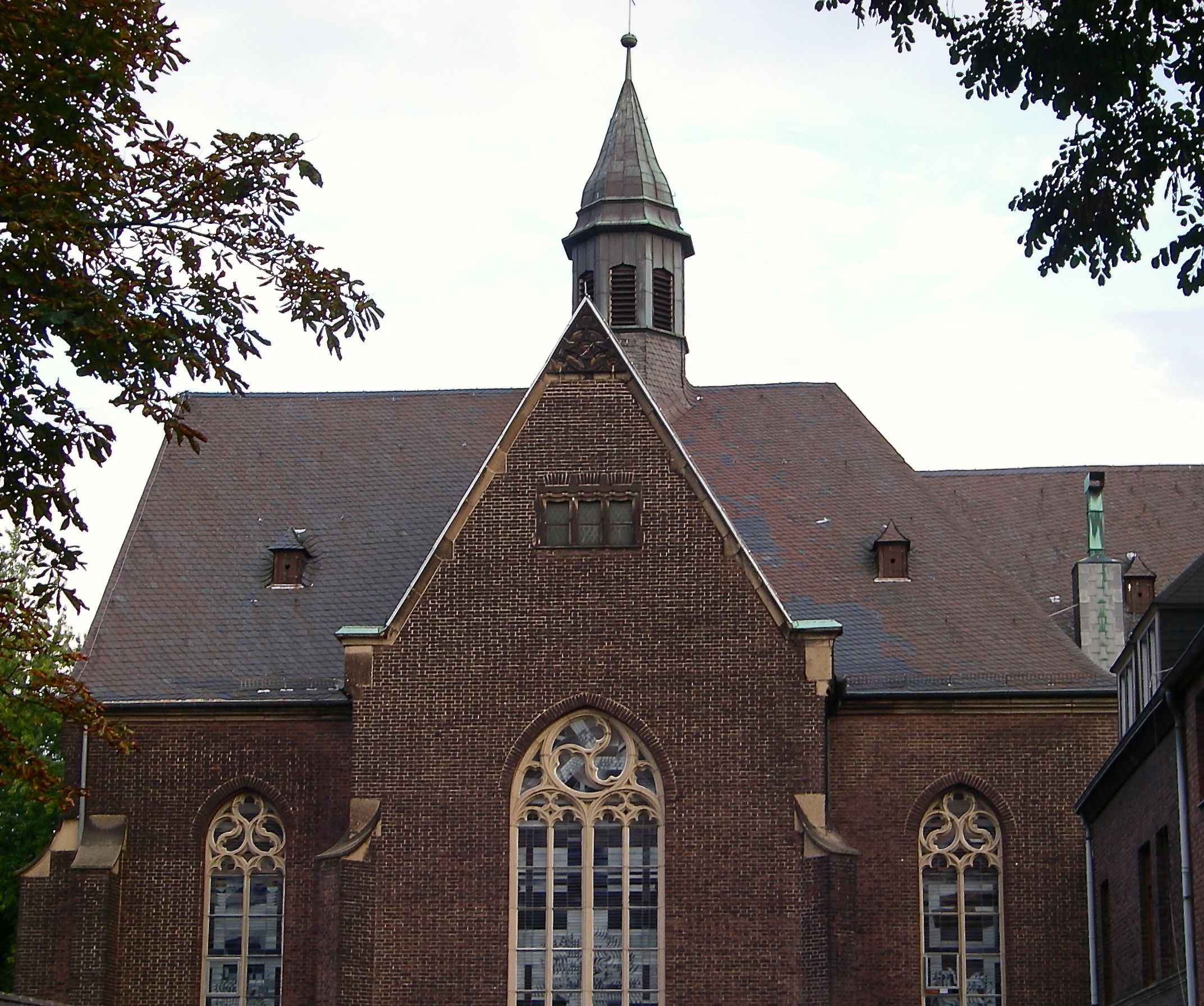 Ansicht der Kirche St. Michael Mülheim an der Ruhr Speldorf von Nordwesten